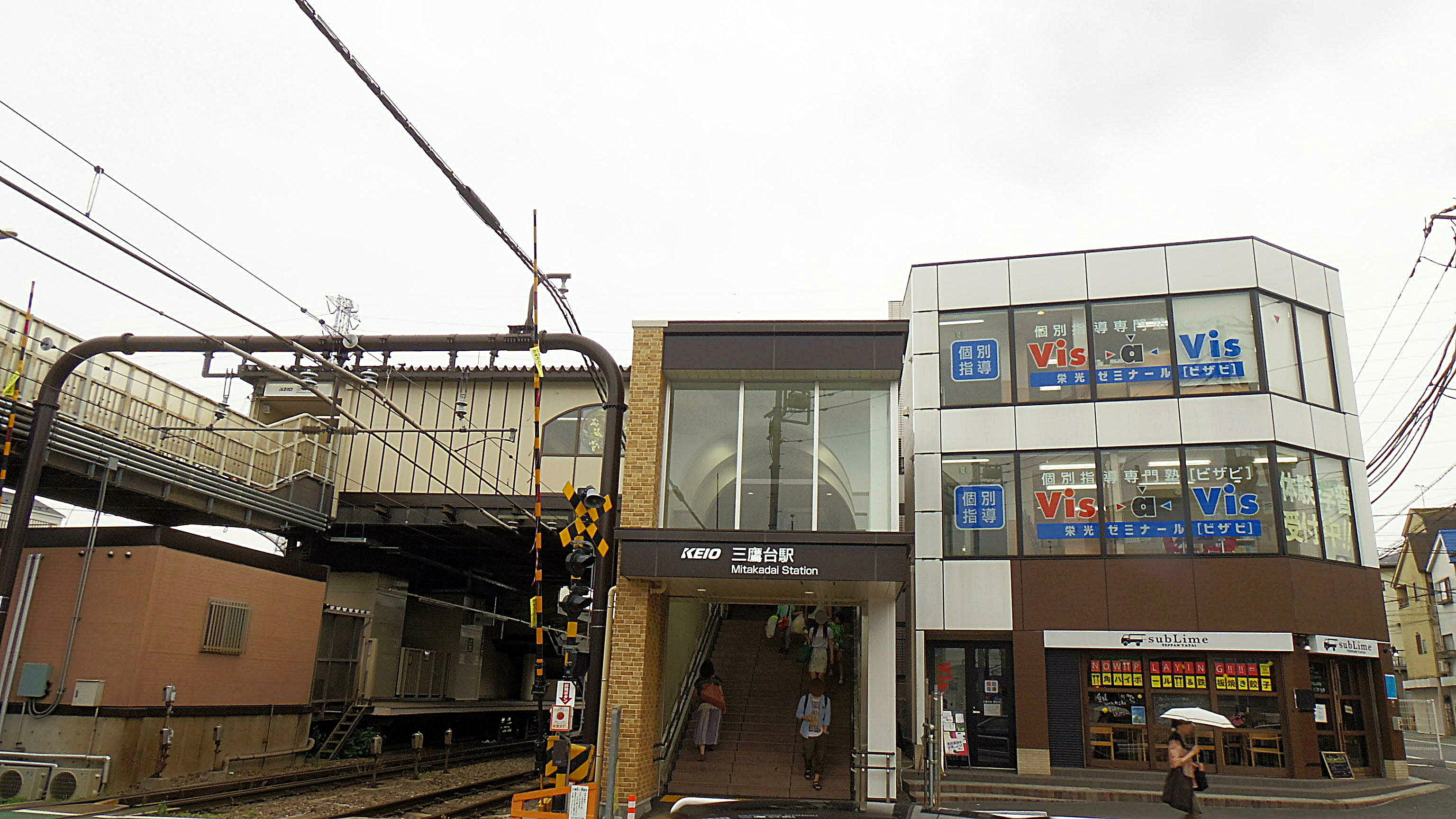 京王井の頭線三鷹台駅（2016年6月19日撮影）